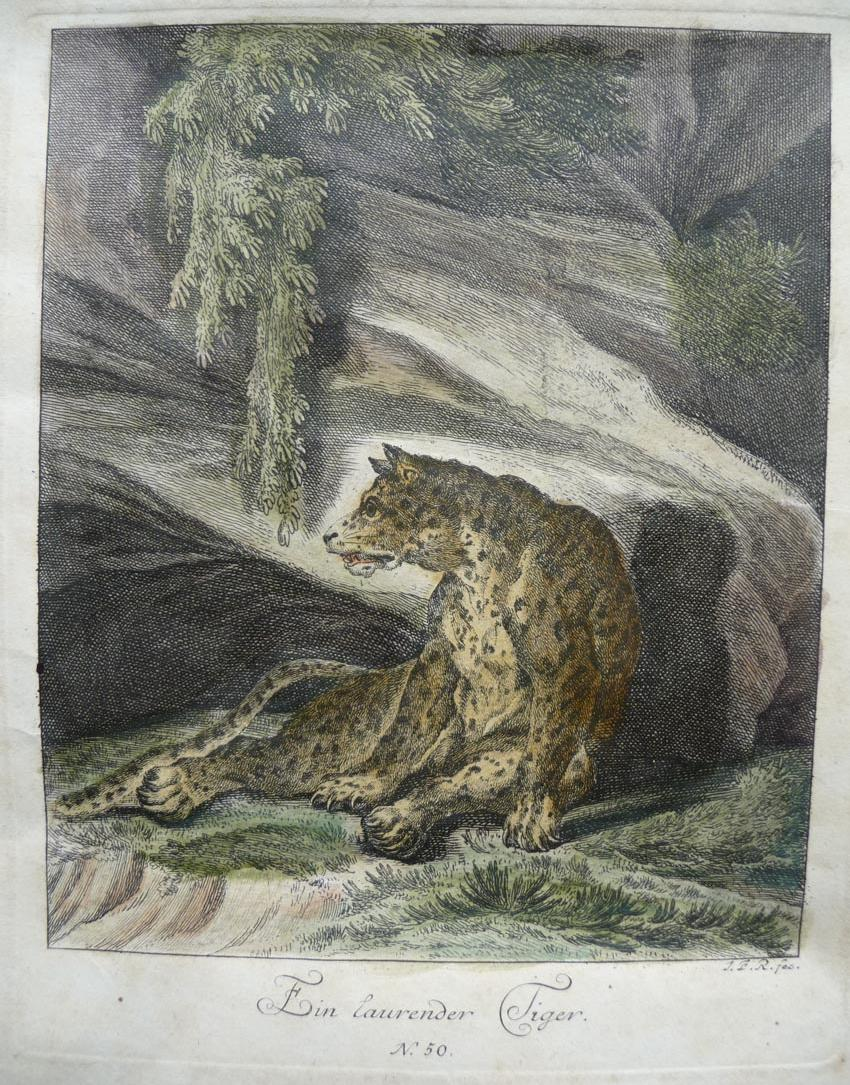 Bilduntertext: "Ein laurender Tiger. N. 50."; colorierter Kupferstich (die heutige Terminologie hatte sich noch nicht durchgesetzt). Aus den Angaben bei Thienemann & Schwarz: 422. – Blatt 32 (in späterer Ausgabe 50) der Suite Entwurf einiger Thiere; Abdruck der 1. Ausgabe auf feinem Bütten; von späterer Hand in attraktiver sujetgemäßer Palette coloriert wie ziemlich ungewöhnlich für originale Drucke.